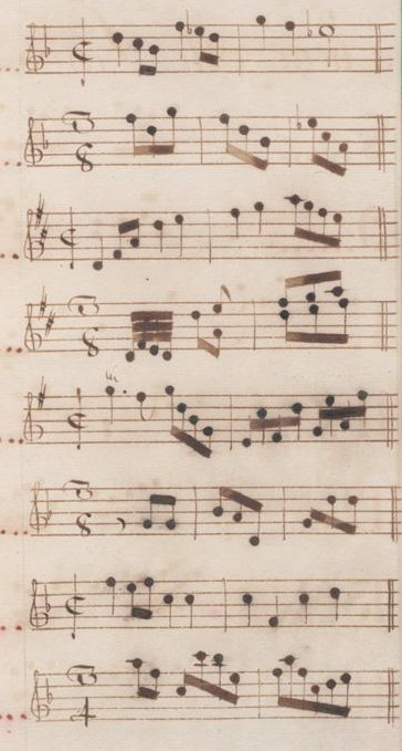 Table du volume VI des manuscrits de Venise (incipit des sonates 15 à 22, K. 310 à 317).